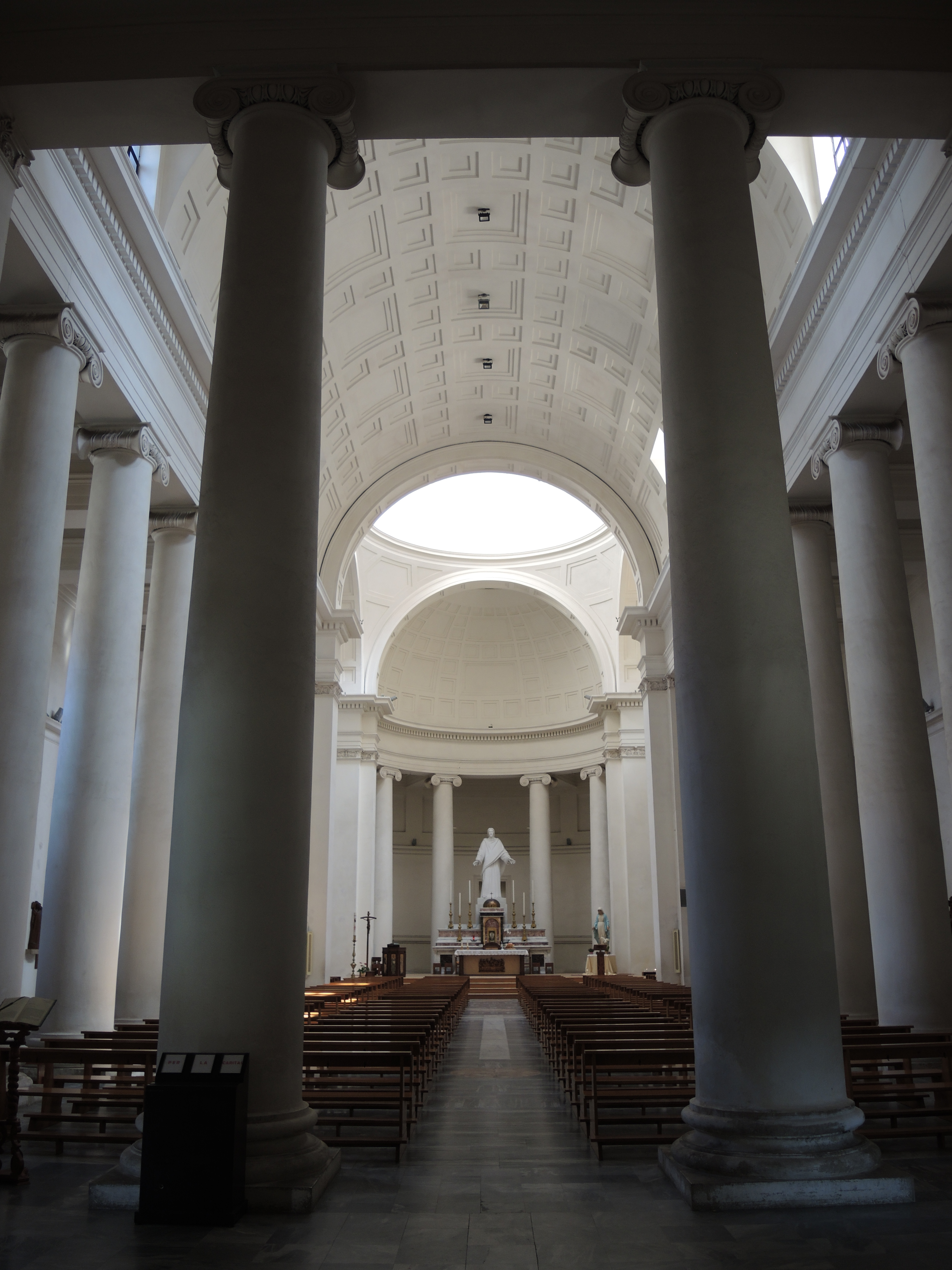 Terracina: Chiesa del Santissimo Salvatore